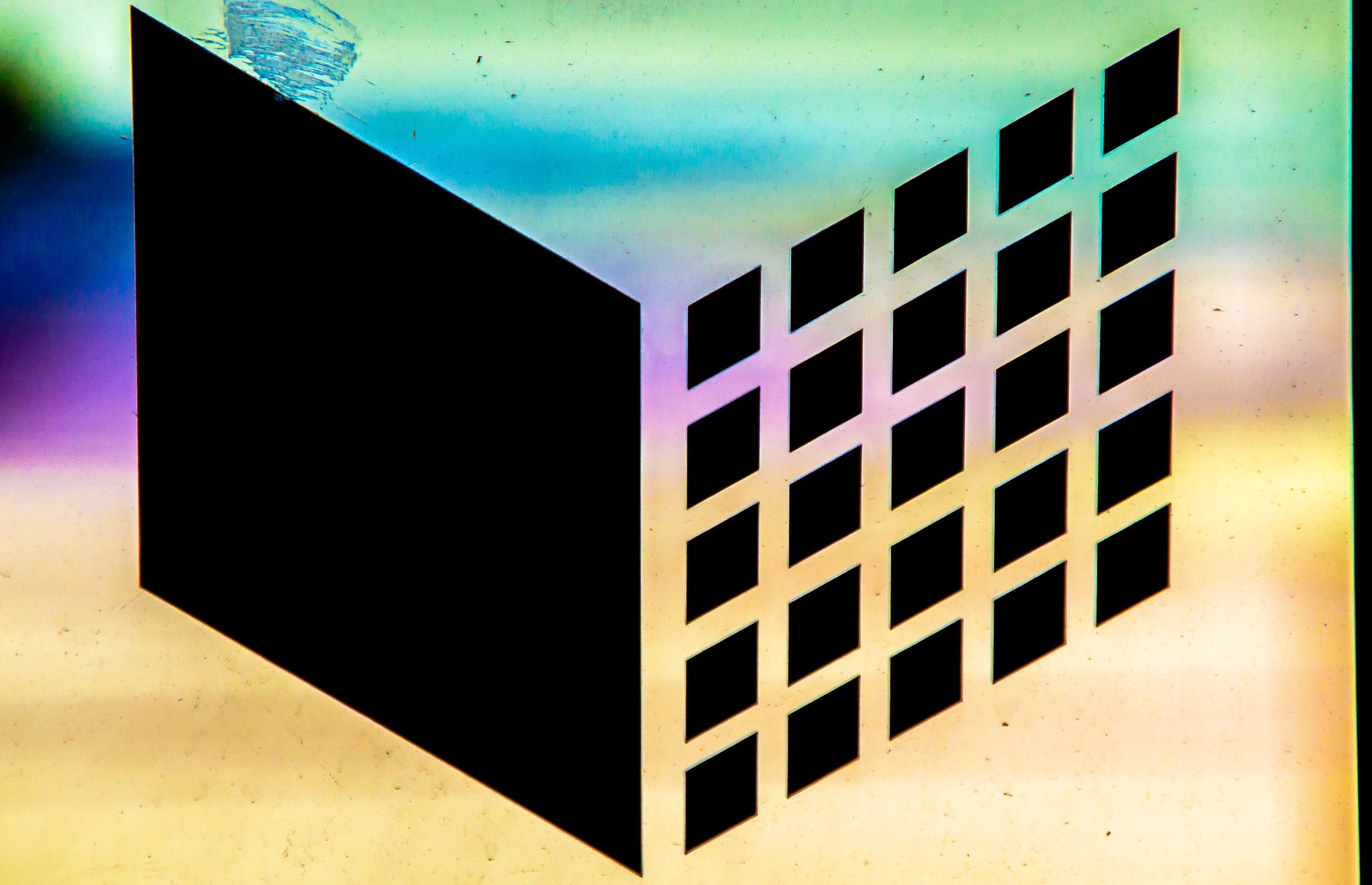 Das neue Logo, seit 2013